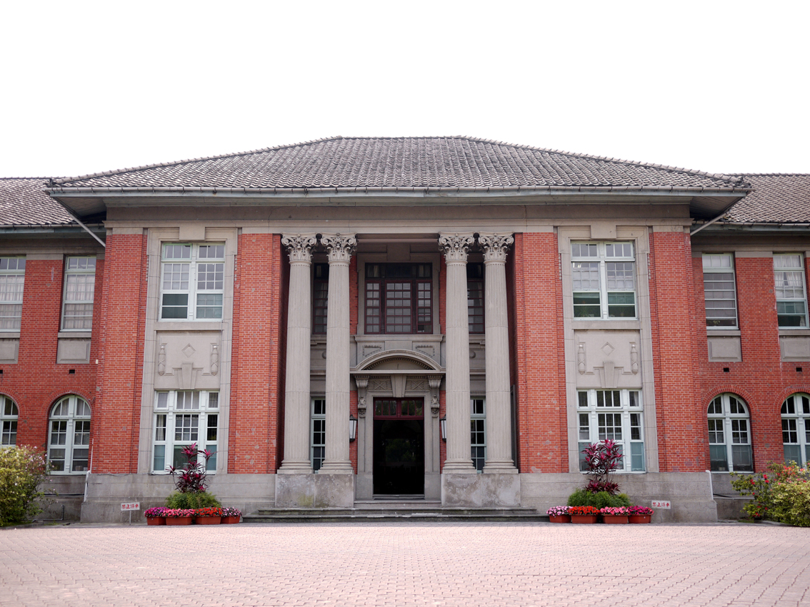 中文（台灣）: 台灣總督府台北高等農林學校（今tw:國立中興大學）校舍，今為tw:國立臺灣大學行政大樓